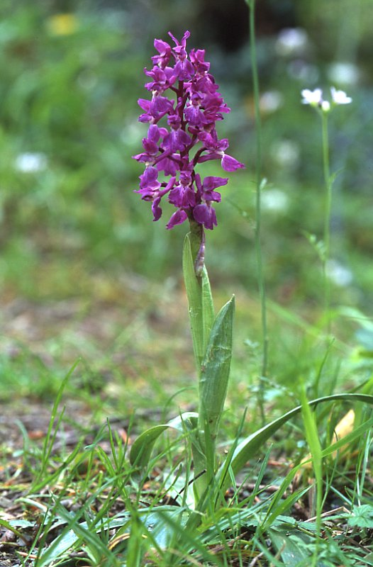 Orchis mascula, photo de utilisateur:cptcv, 2 mai 2003, Holzarté (64)